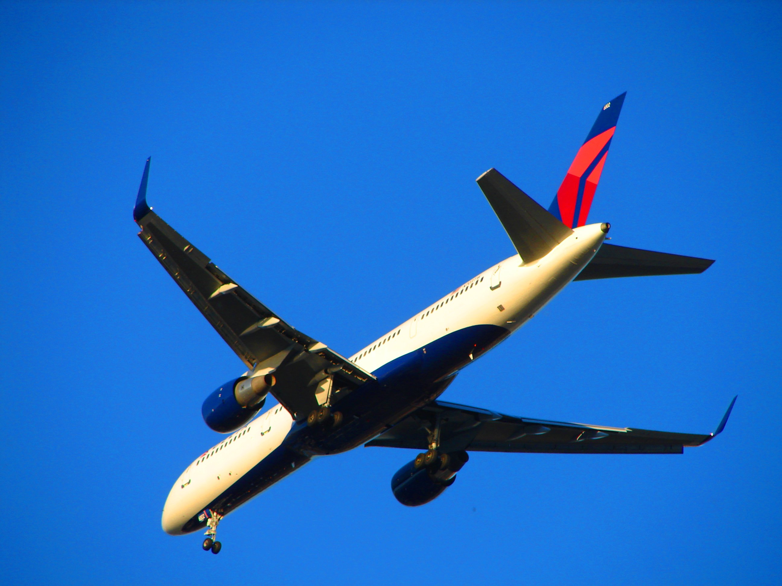 ന്യൂ യോർക്ക് ജോൺ എഫ് കെന്നഡി വിമാനത്താവളത്തിലേക്ക് പറന്നിറങ്ങുന്ന യാത്രാവിമാനം